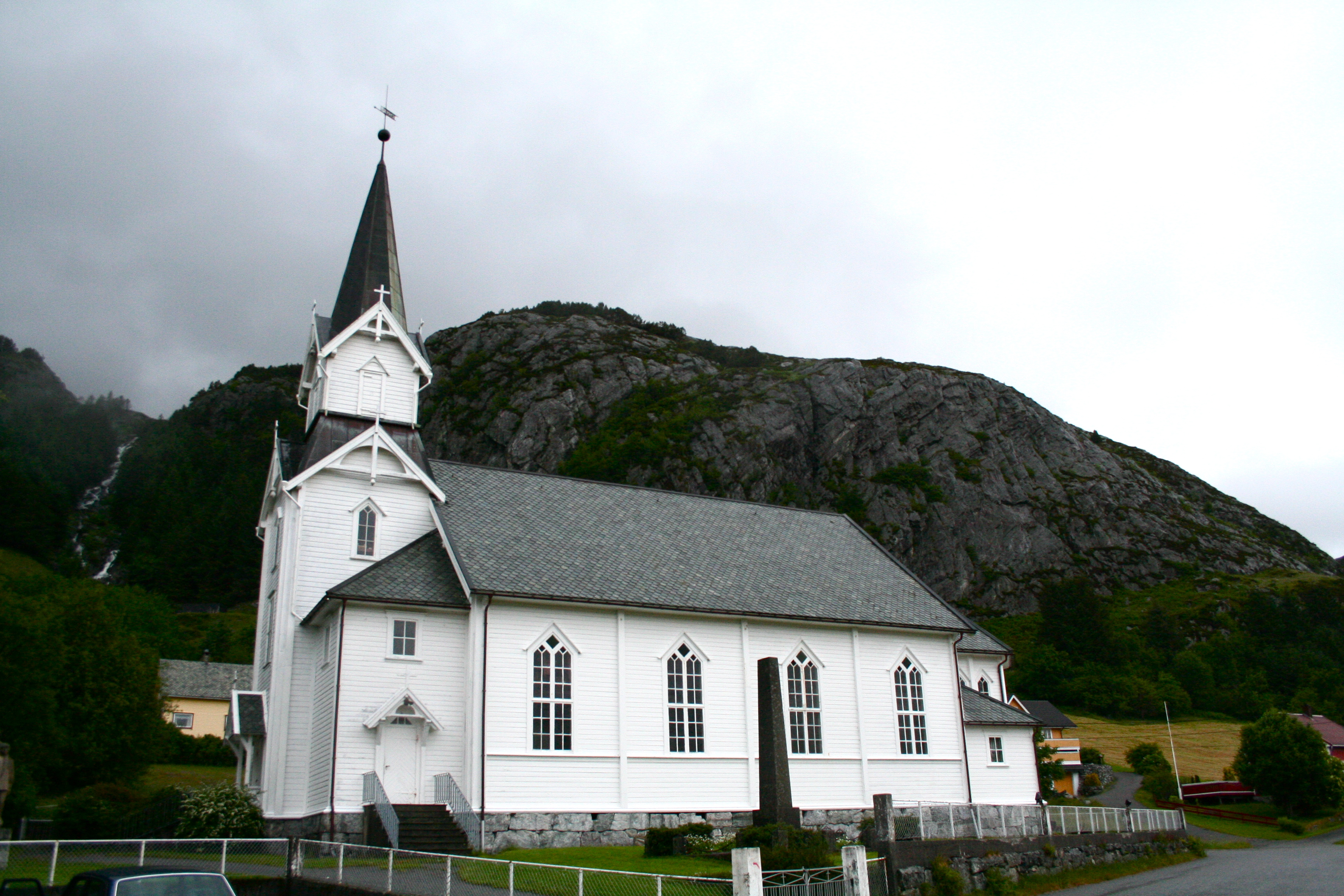 Bilete av Bremanger Kyrkje frå vegen.